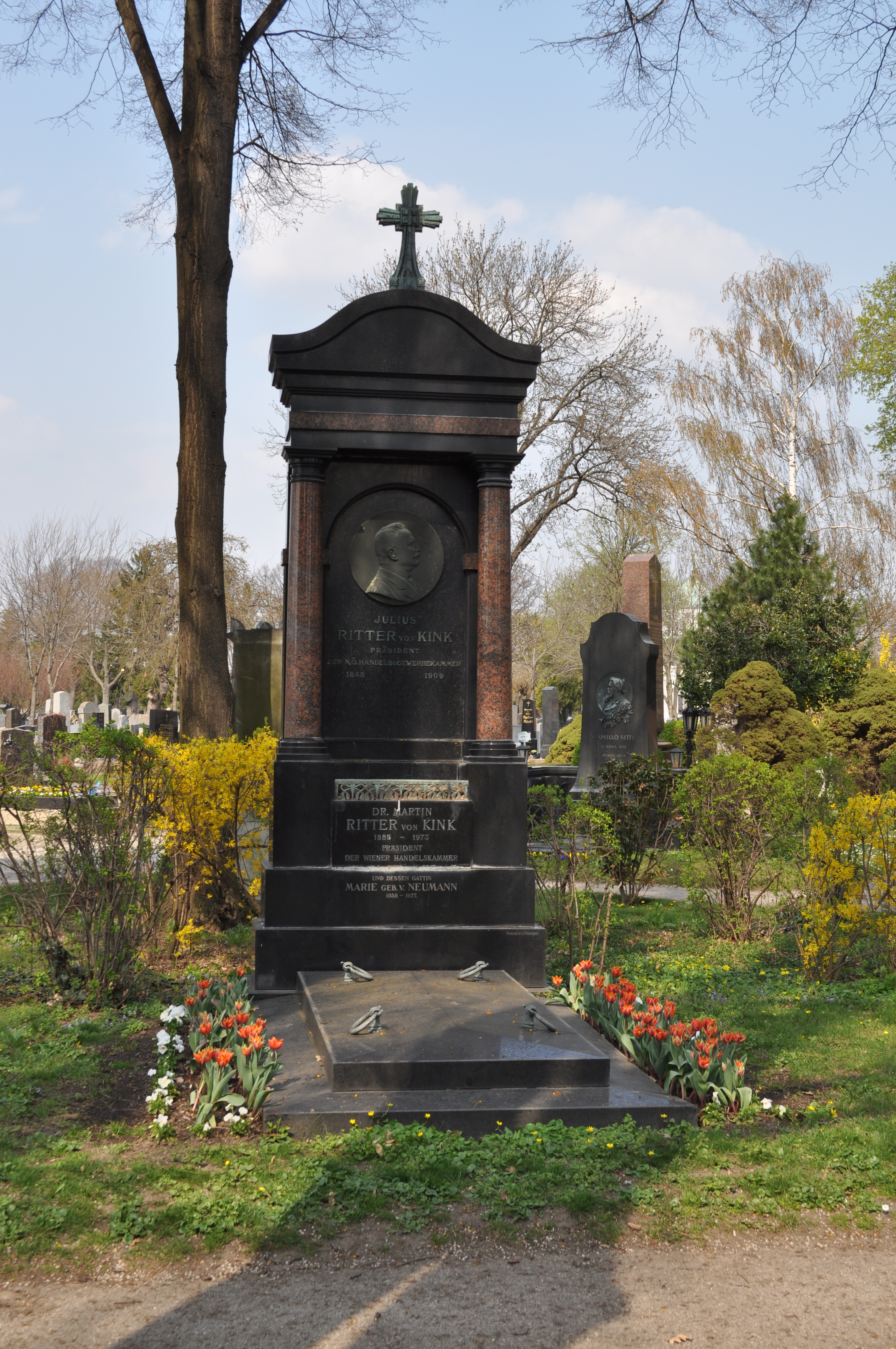 Wien, Zentralfriedhof, Grab Julius Ritter von Kink und Martin Ritter von Kink